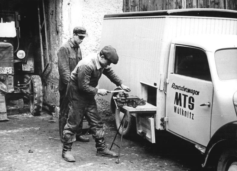 Wülknitz, Reperaturwagen der MTS Zentralbild Siegert 27.1.1956 Vorbereitungen zur Frühjahrsbestellung Neuer Werkstattwagen in der MTS Wülknitz Aus einem gebauten Framo-Wagen richteten sich die Kollegen der MTS Wülknitz, Kreis Riesa, einen Werkstattwagen ein, der neben sämtlichen Spezialwerkzeugen, einem Schweißgerät auch alle in Frage kommenden Ersatzteile mit sich führt. Mit diesem Werkstattwagen können die Kollegen während der Frühjahrsbestellung fast alle anfallenden Reparaturen an Ort und Stelle ausführen. UBz: Die Kollegen Baier und Wenzel mit dem Reparaturwagen der MTS beim Einsatz auf der LPG "1.Mai" in Peritz, Kreis Riesa.